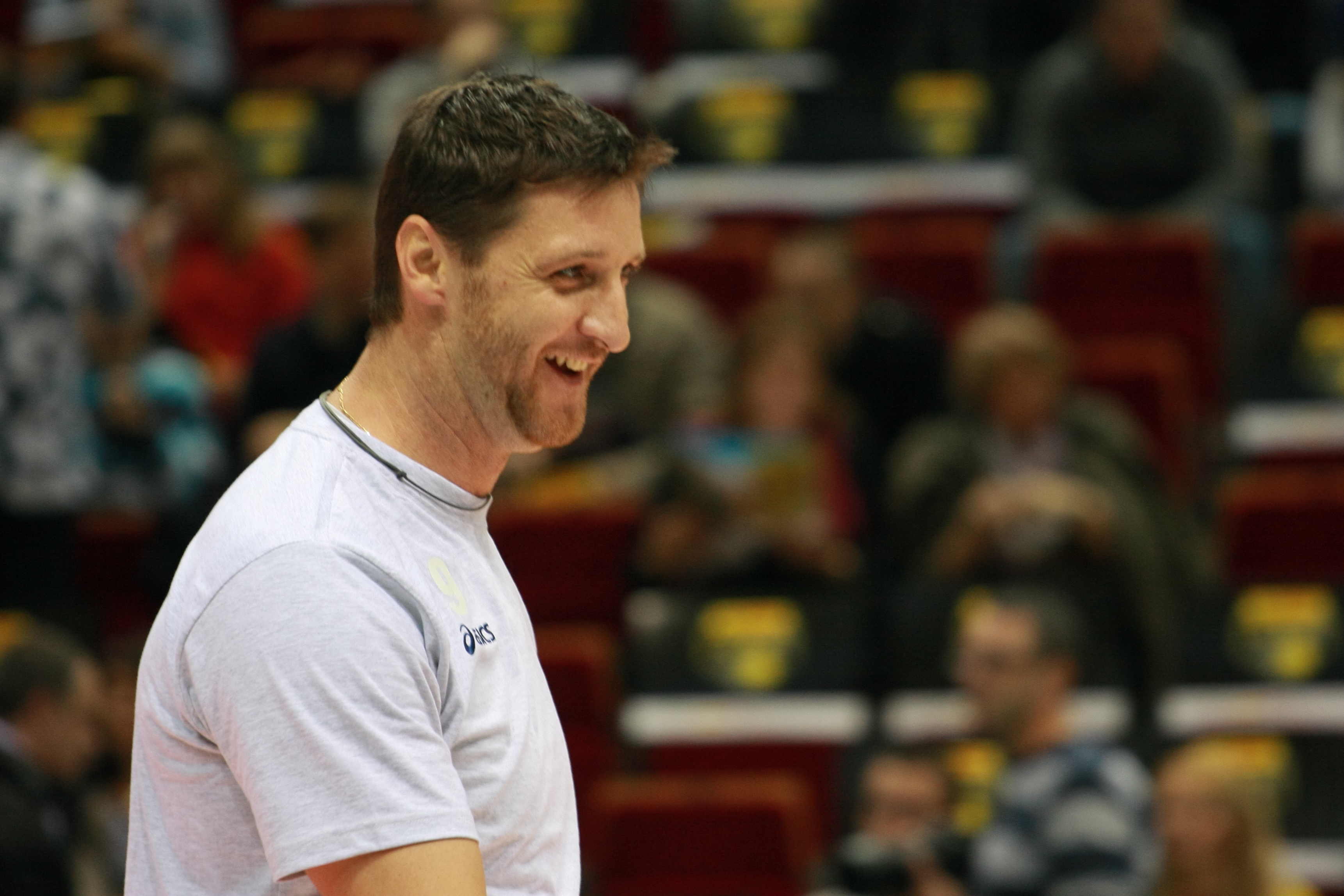 Piotr Gruszka